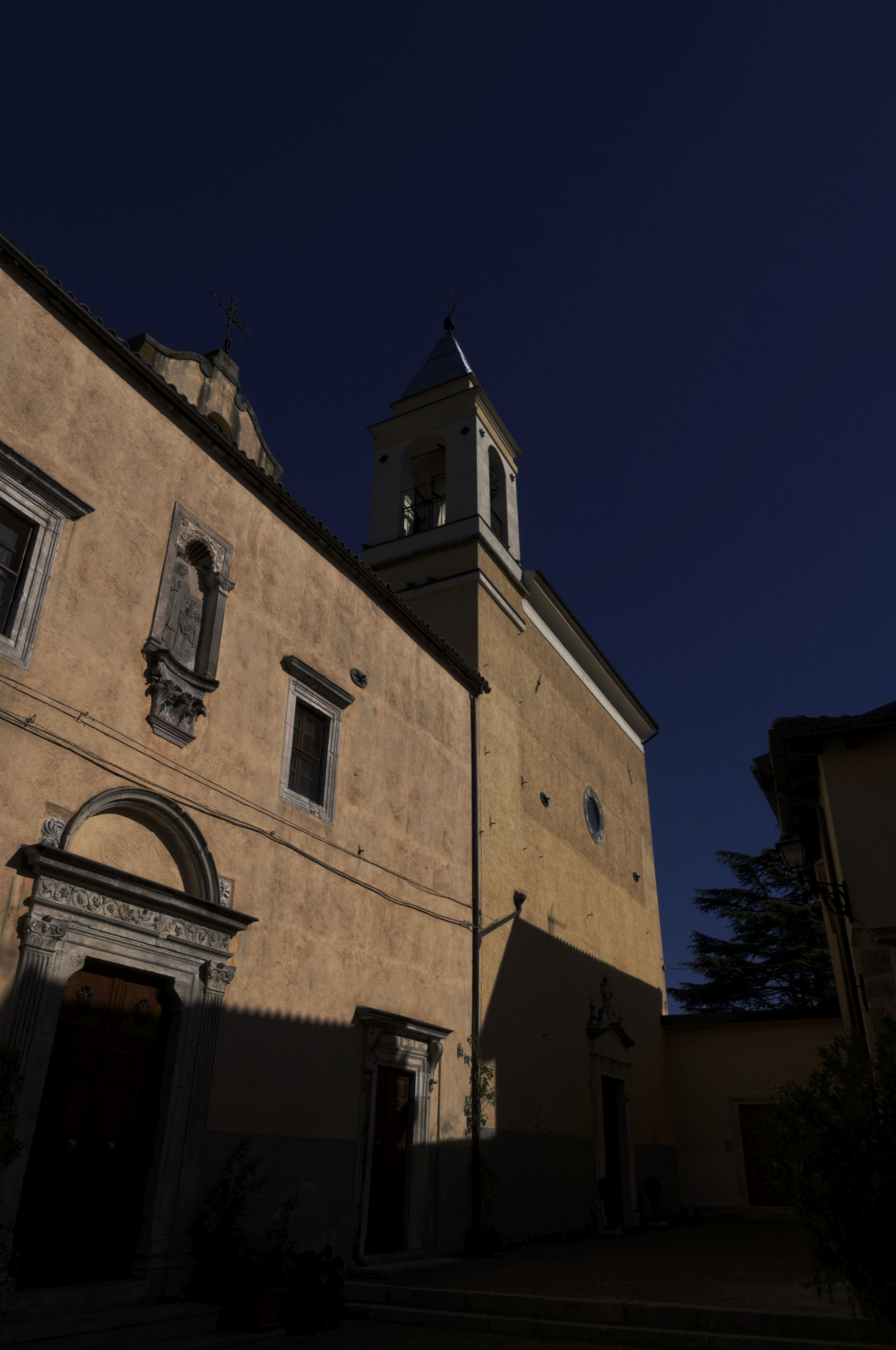 Pratola Peligna - 2017